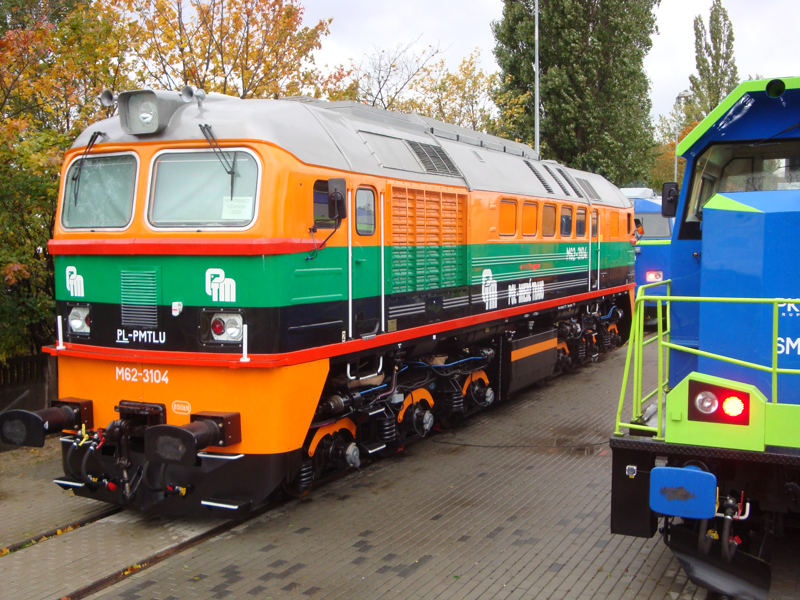 Zmodernizowana lokomotywa spalinowa M62 należąca do Pol-Miedź Trans i prezentowana podczas targów kolejnictwa "Trako" w Gdańsku.